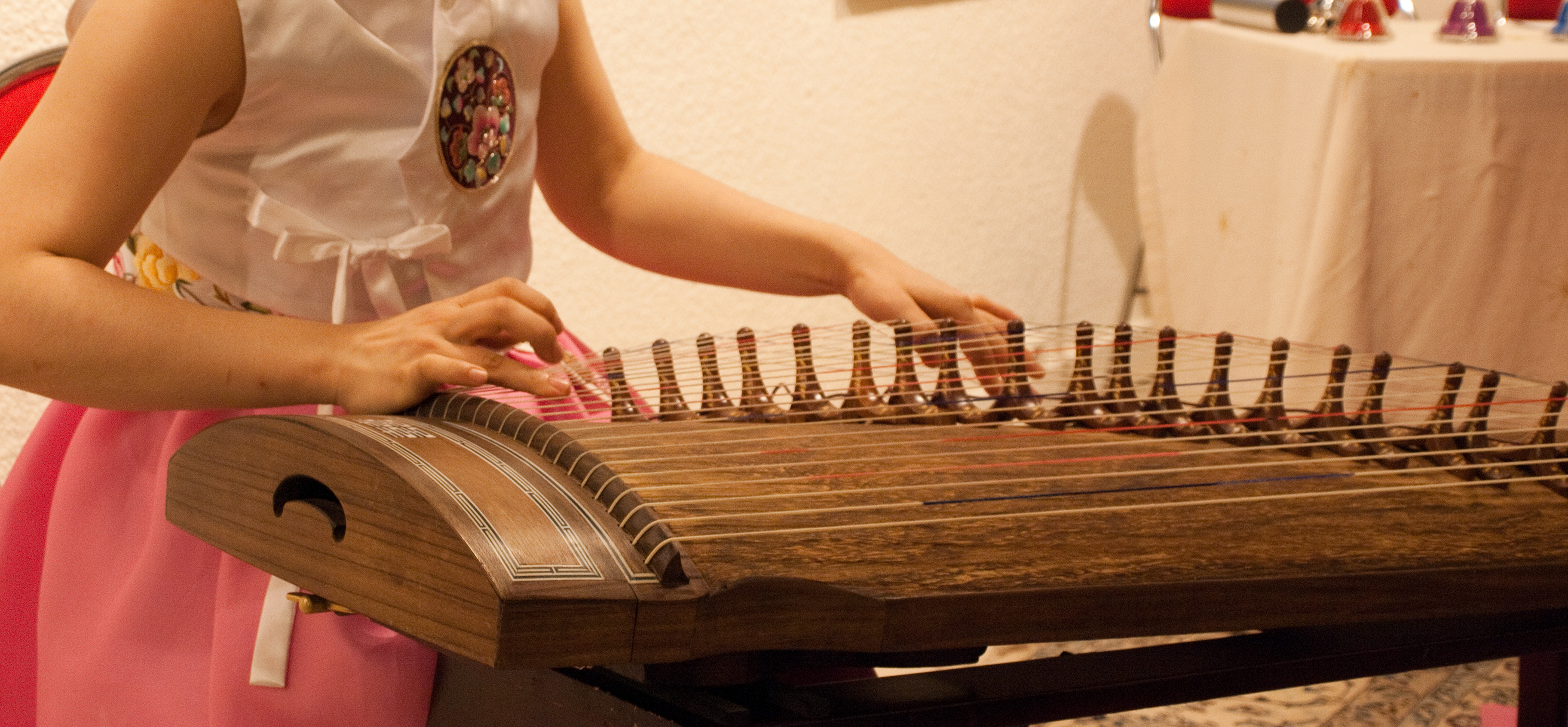 2011.08.05 - Concert Kwak SooEun & l’ensemble de gayageum La-on G 2011.08.05 - 콘서트 곽수은 & 가야금앙상블 ‘라온G' Centre Culturel Coréen - Paris